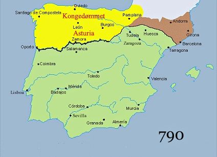 Reino de Asturias, Königreich Asturien, Kingdom of Asturias 790